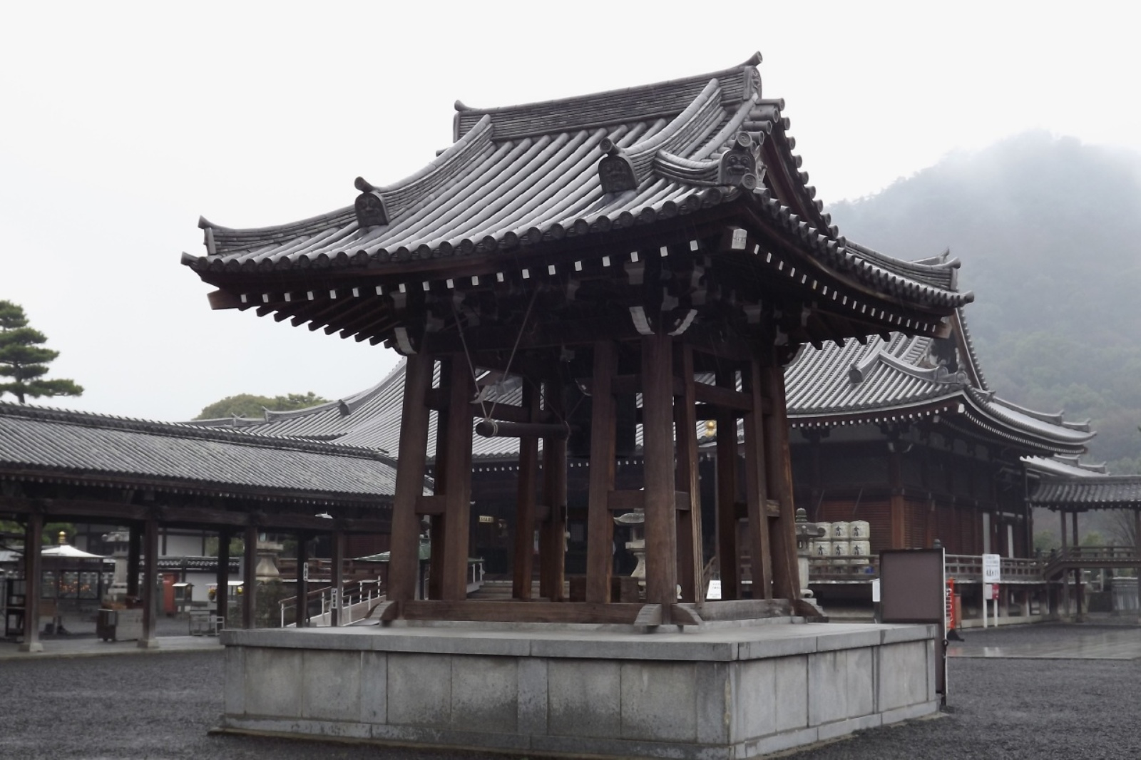 善通寺の鐘楼